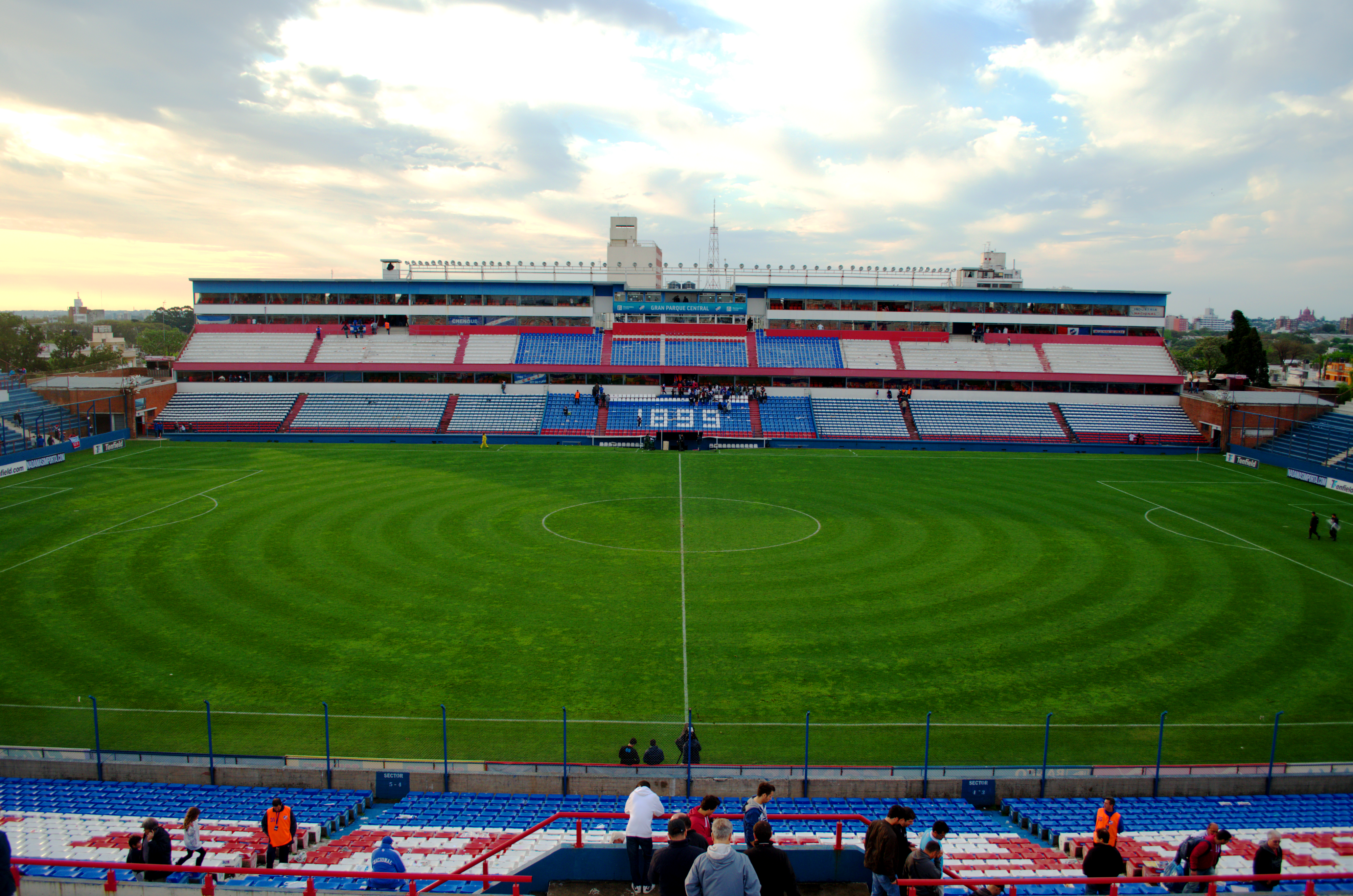 Imagen del estadio Gran Parque Central.